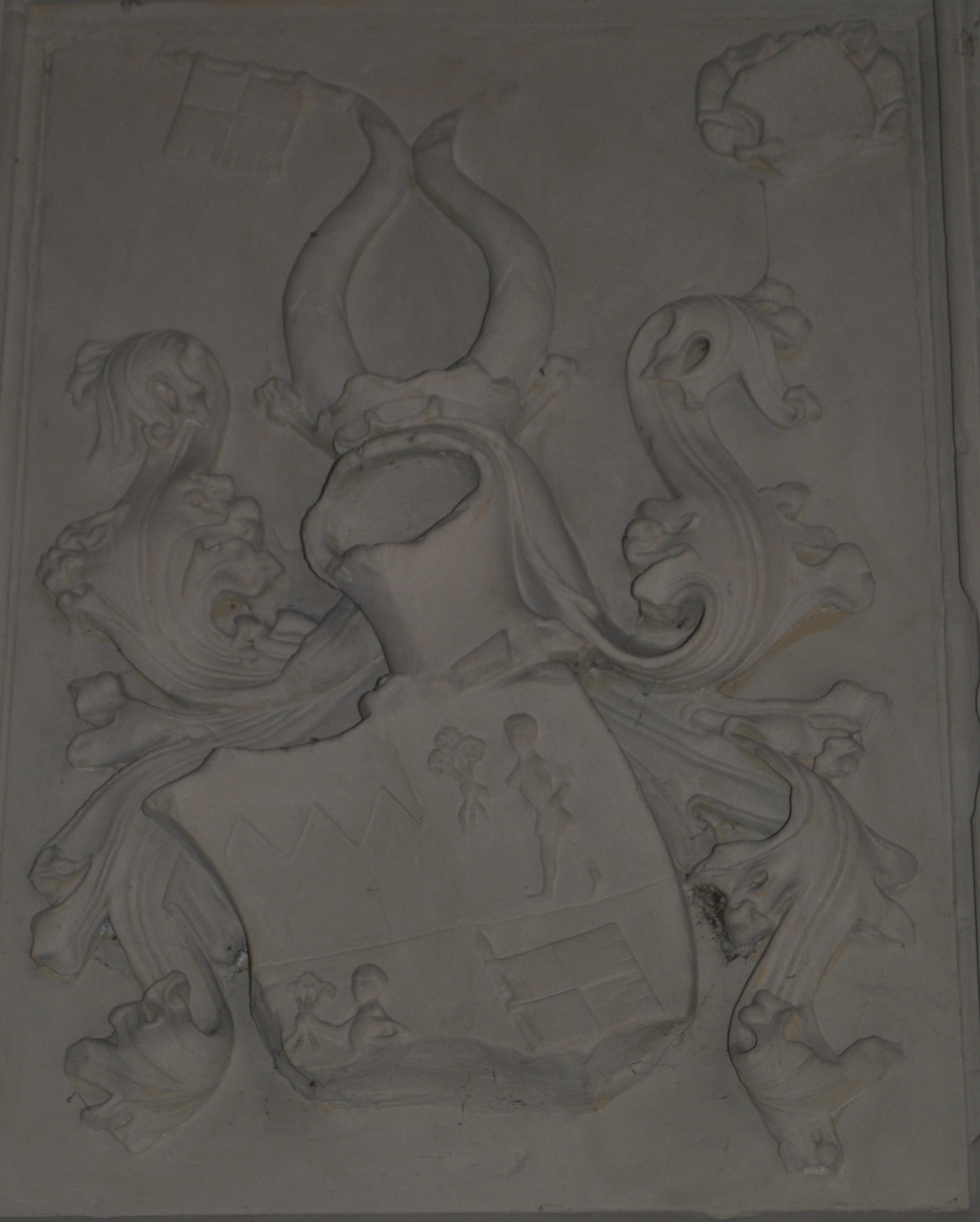 Katholische Filialkirche St. Maria ehemalige Augustinerchorherren-Stiftskirche, dreiseitig geschlossener Chor und nördlich angelehnter Turm 1458-1463, ursprüngl. Bau nach Plänen von Johann Michael Fischer umgebaut, Langhaus 1789, Westfassade 1789/94; mit Ausstattung